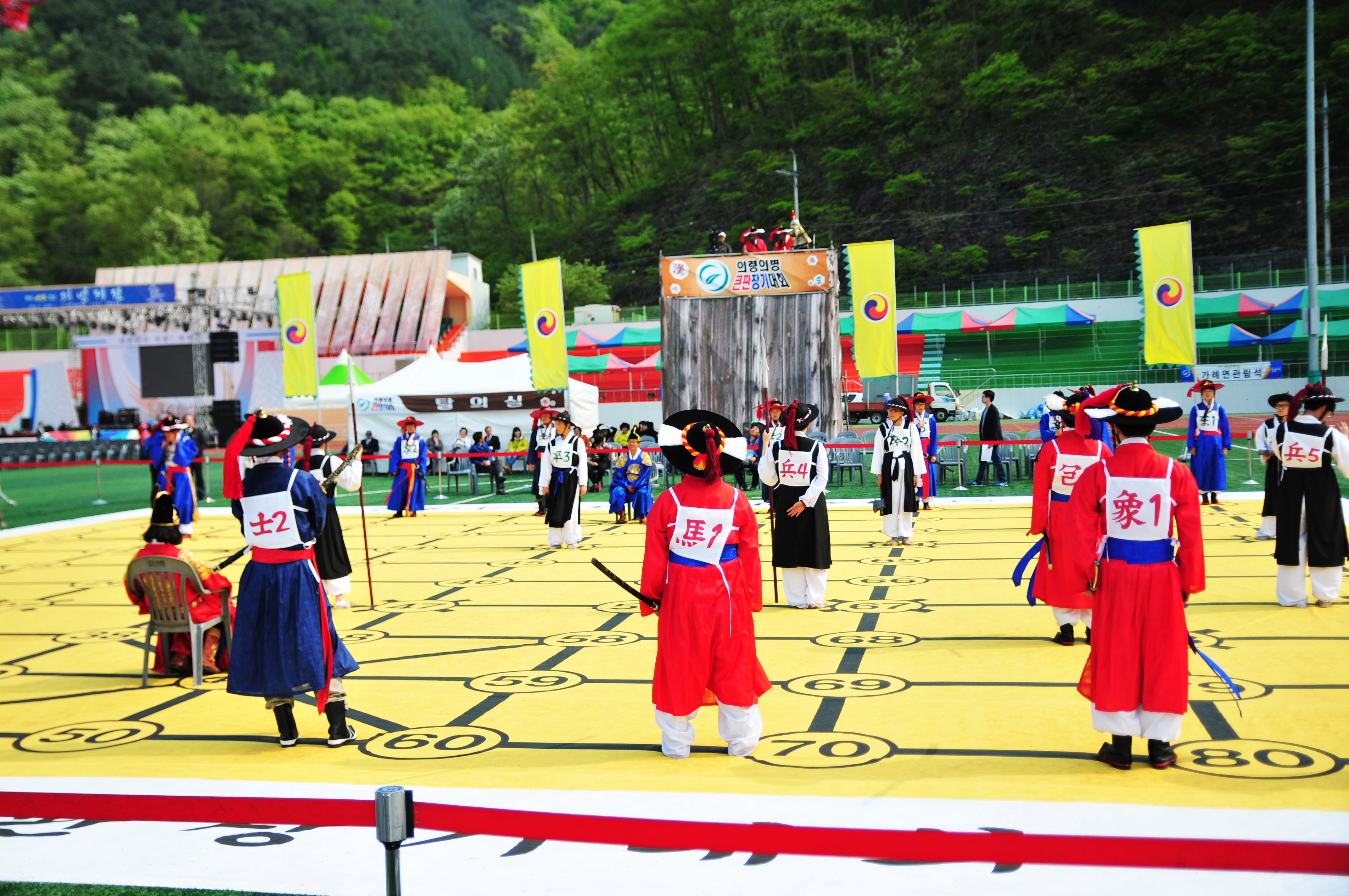 의병창의 423주년을 맞이하여 부활한 전통축제